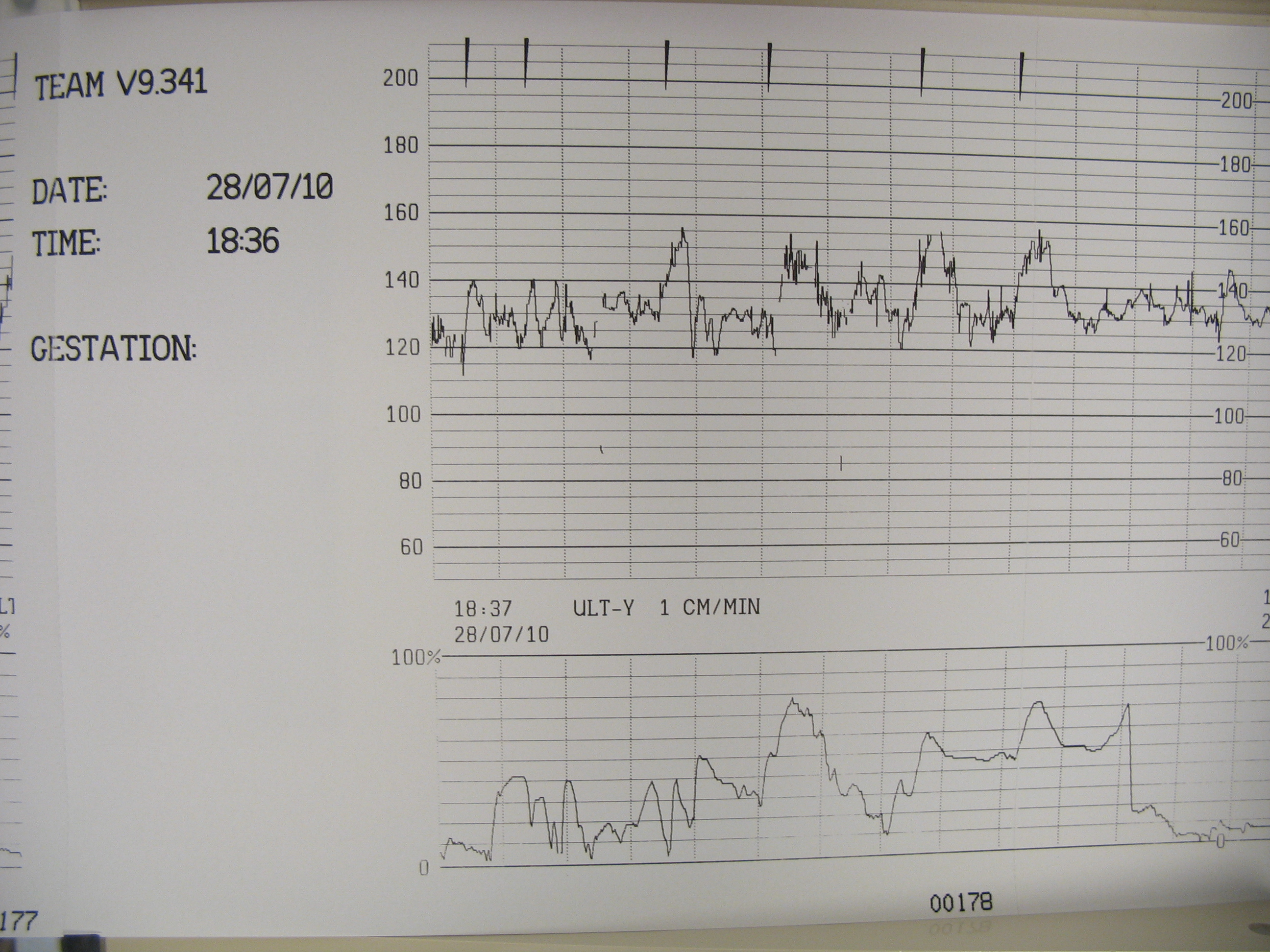 Kardiotokogramm, mis näitab emaka kokkutõmbeid ning loote südametööd